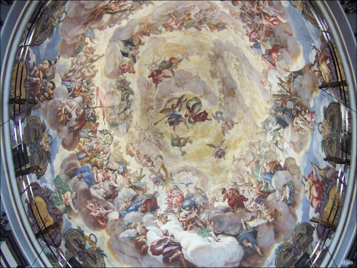 Cúpula de la Basílica de los Desamparados en Valencia con frescos de Antonio Palomino.